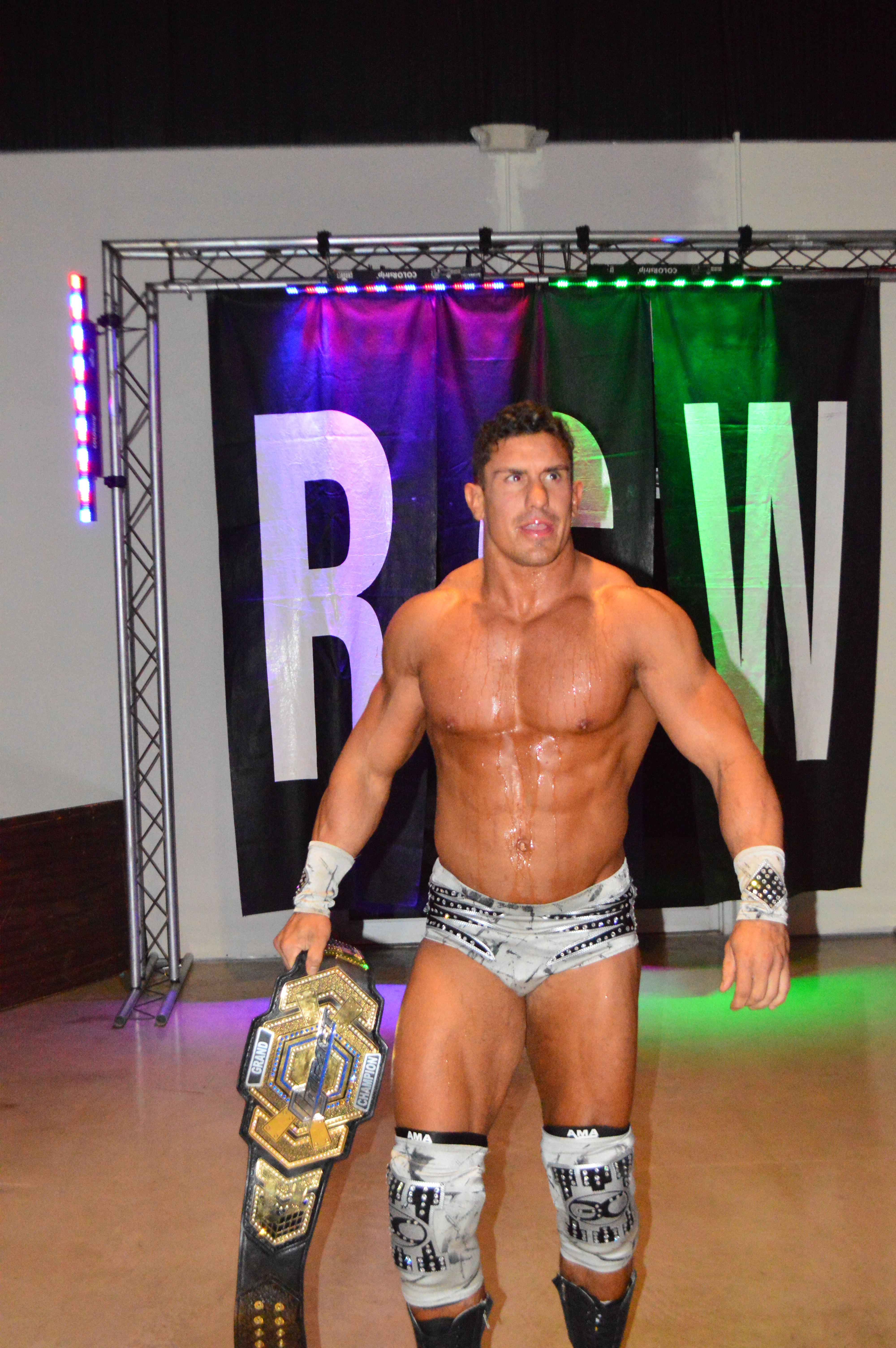 Le catcheur Ethan Carter III en 2017 avec la ceinture de champion Grand Impact en 2017.